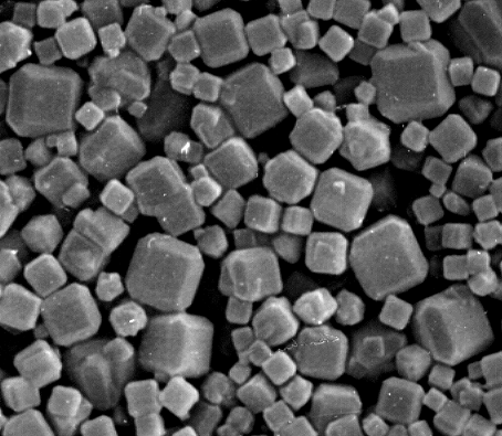 Elektronenmikroskopische Abbildung von Zeolith-A-Kristallen